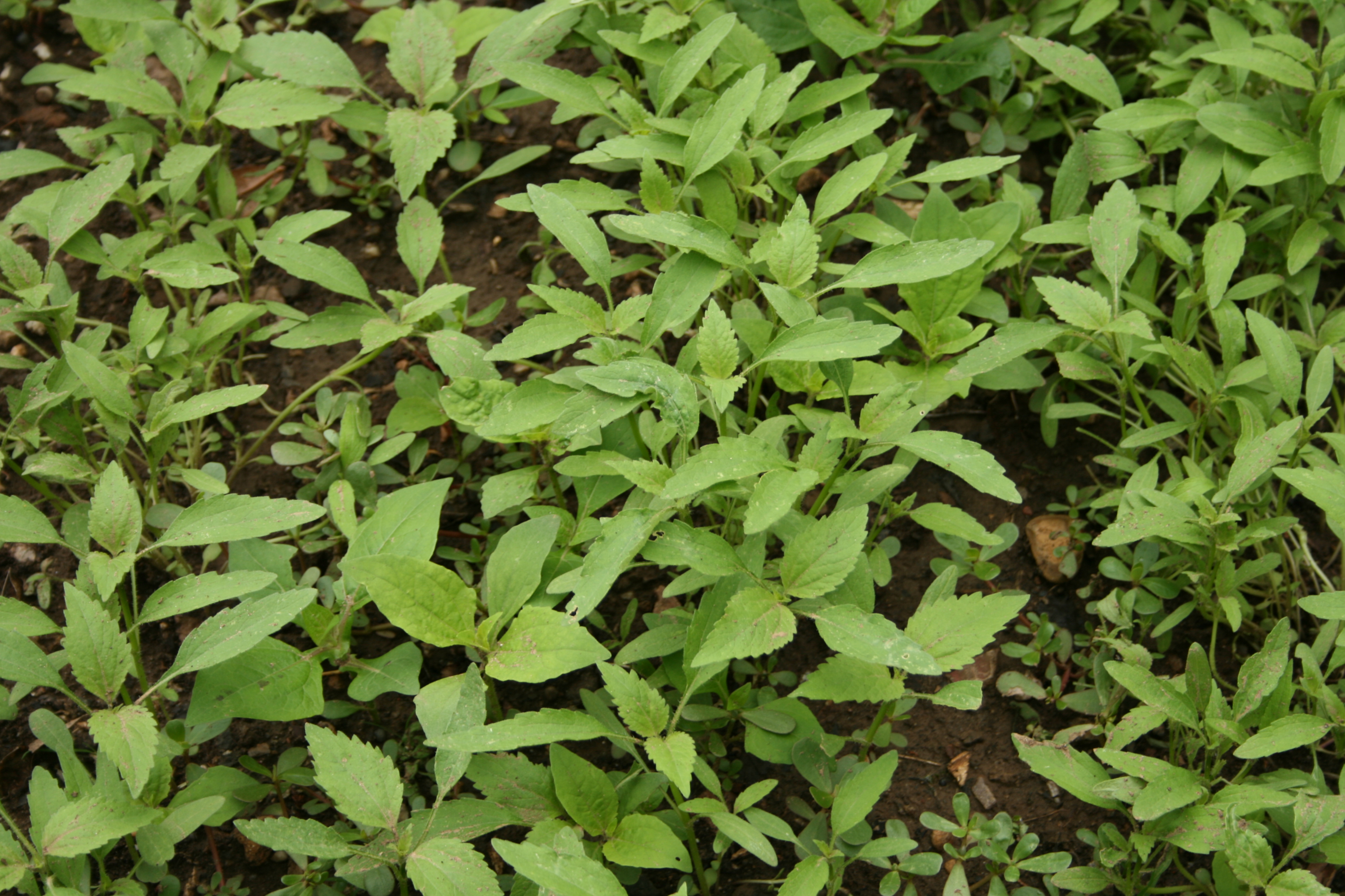 Iva